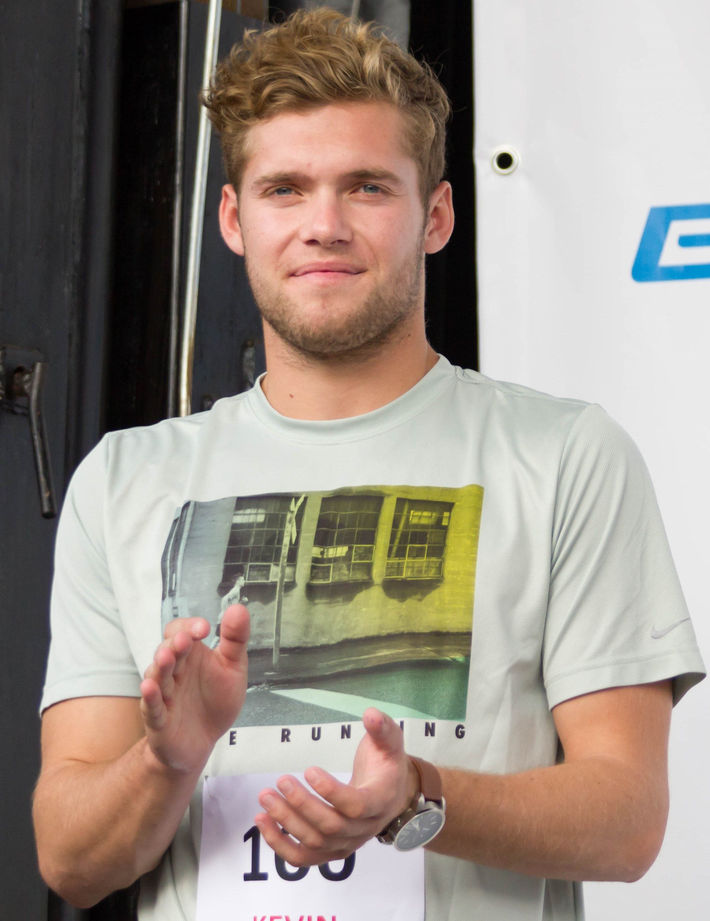 Kevin Mayer, parrain du marathon de Toulouse Métropole 2014